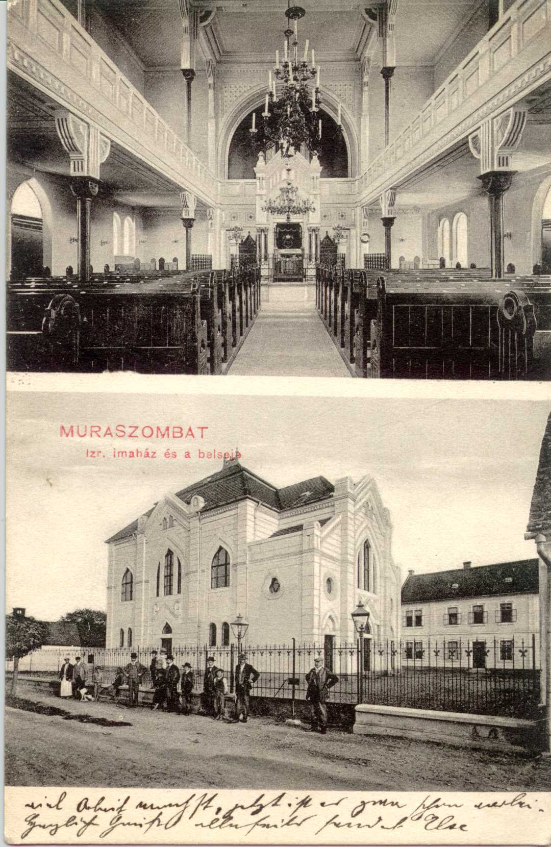 Postcard of Murska Sobota Synagogue.